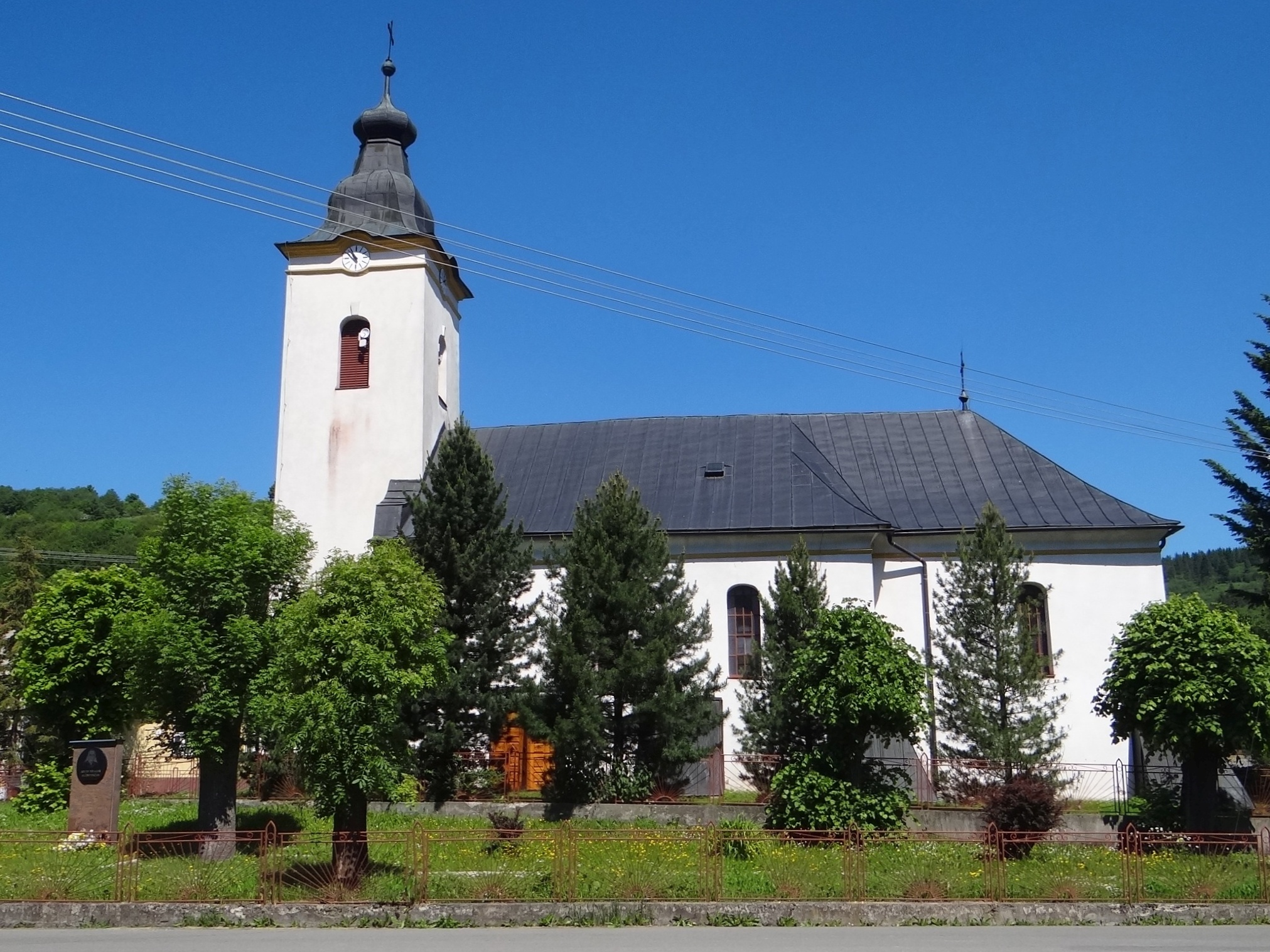 Kolačkov